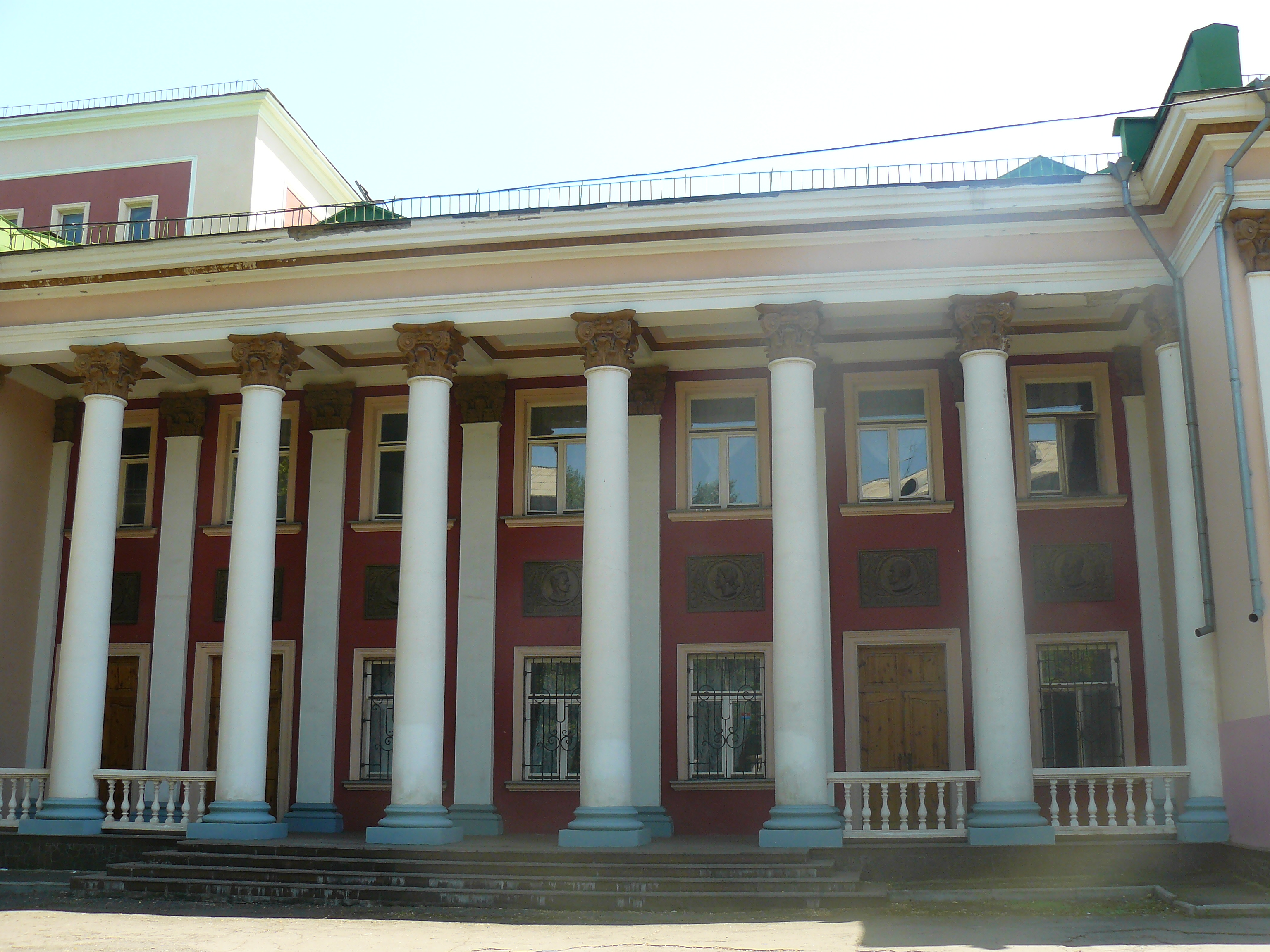 ДК «Сухая балка» им. Б. Хмельницкого, г. Кривой Рог.